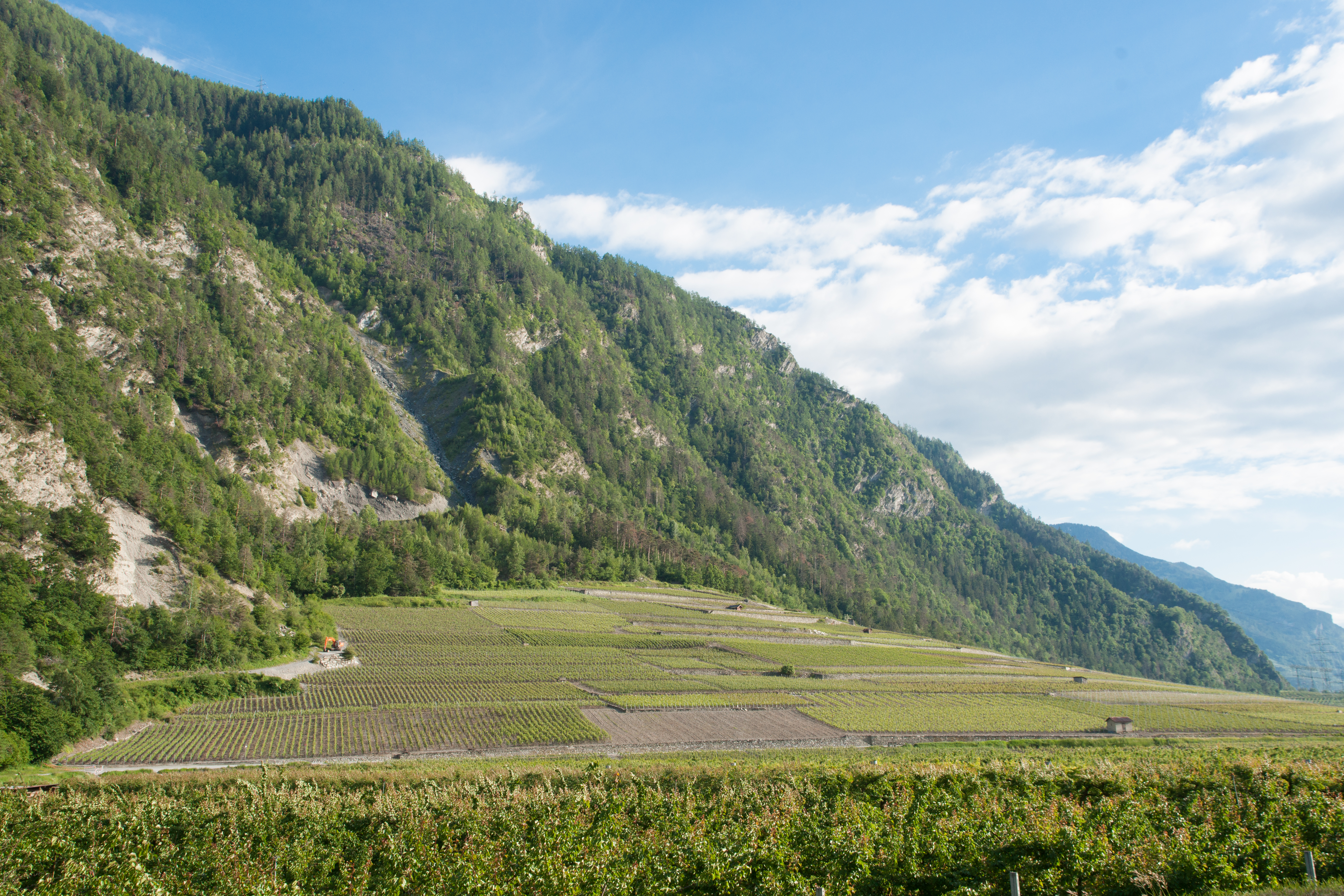 Cône d'Arbin, cône de déjection situé sur le versant nord de la dent de Nendaz, en Valais (suisse).